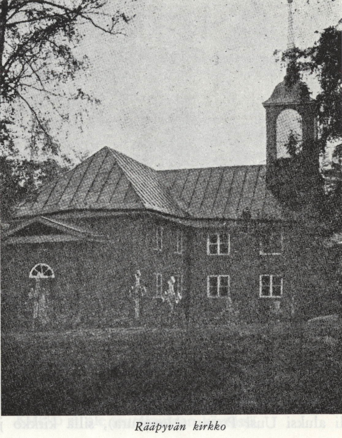 Кирха в деревне Румболово. Приход Рябово. 1911 г.